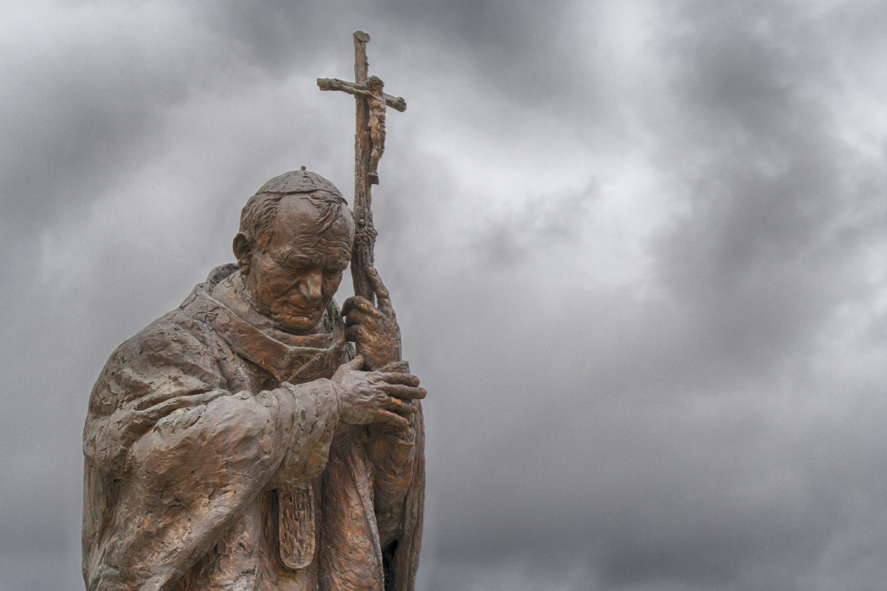 La ciudad de Alcalá al ' Papa Juan Pablo II Maestro de humanidad, testigo del Evangelio, hombre de esperanza y servidor de la paz. MMVI Monumento a Su Santidad Juan Pablo II en los jardines de Juan Pablo II. Alcalá de Henares Comunidad de Madrid España